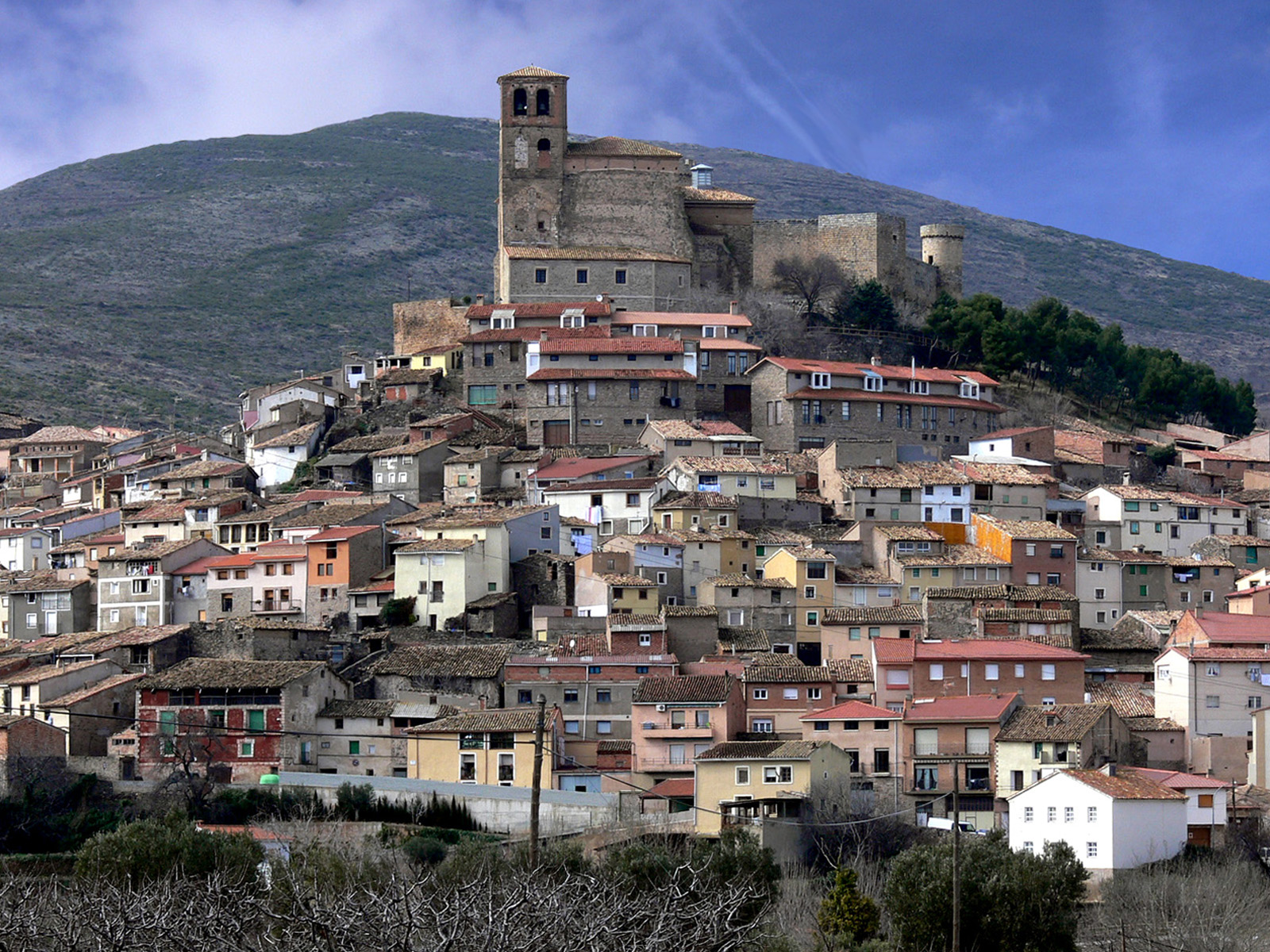 Cornago, La Rioja - España.